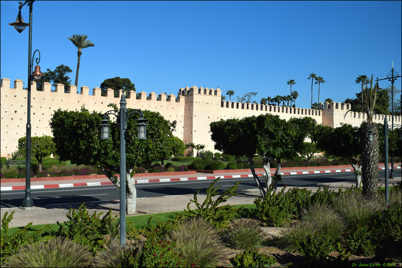 Marrakech 65DSC_0696